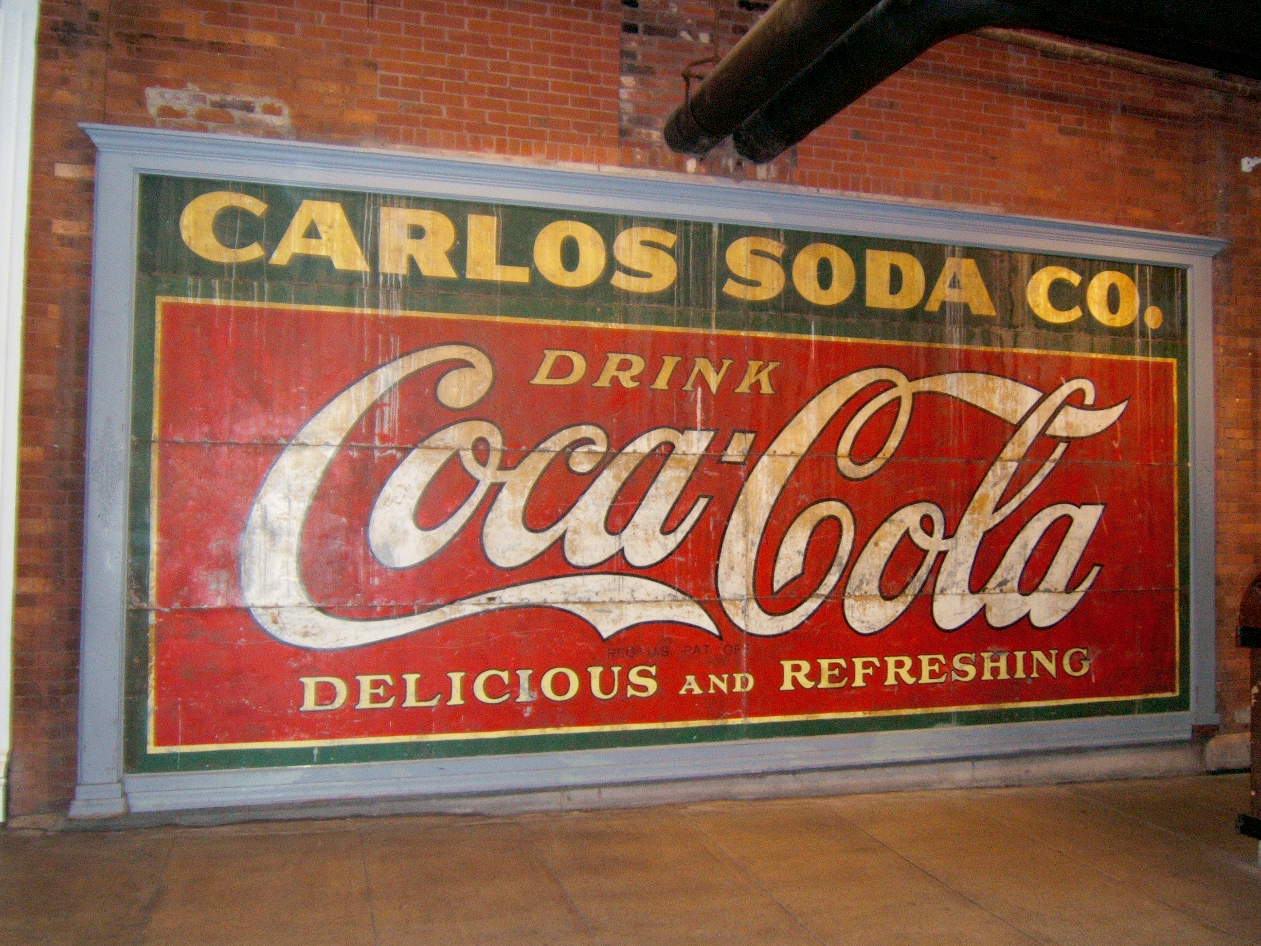 Ancienne affiche publicitaire Coca-Cola bien conservée dans une rue, maintenant souterraine, du vieil Atlanta.